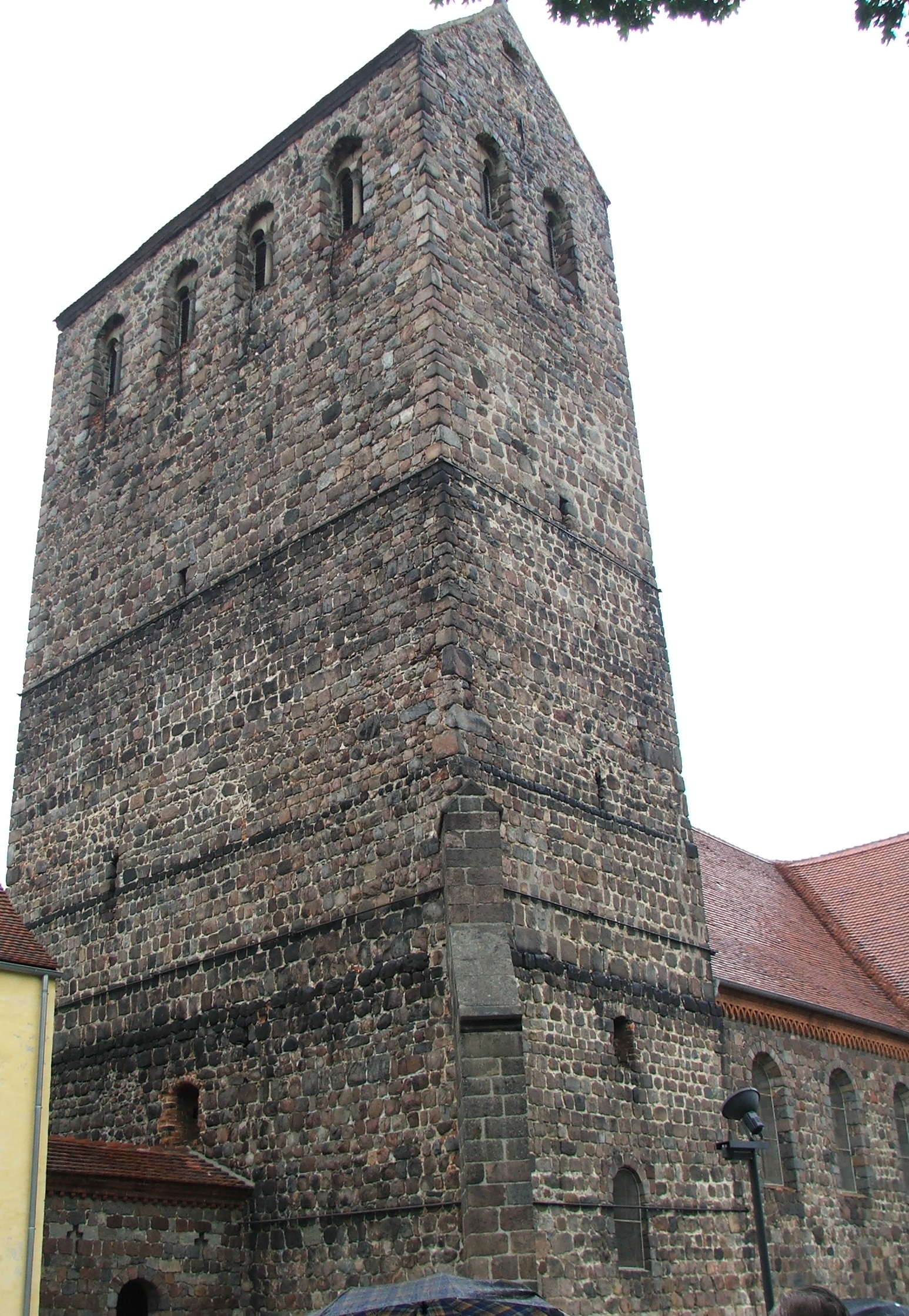 Bildbeschreibung: Stadtkirche Heilig Kreuz in Ziesar Quelle: selbst fotografiert Fotograf: Andreas Schulz Datum: 20. Mai 2006